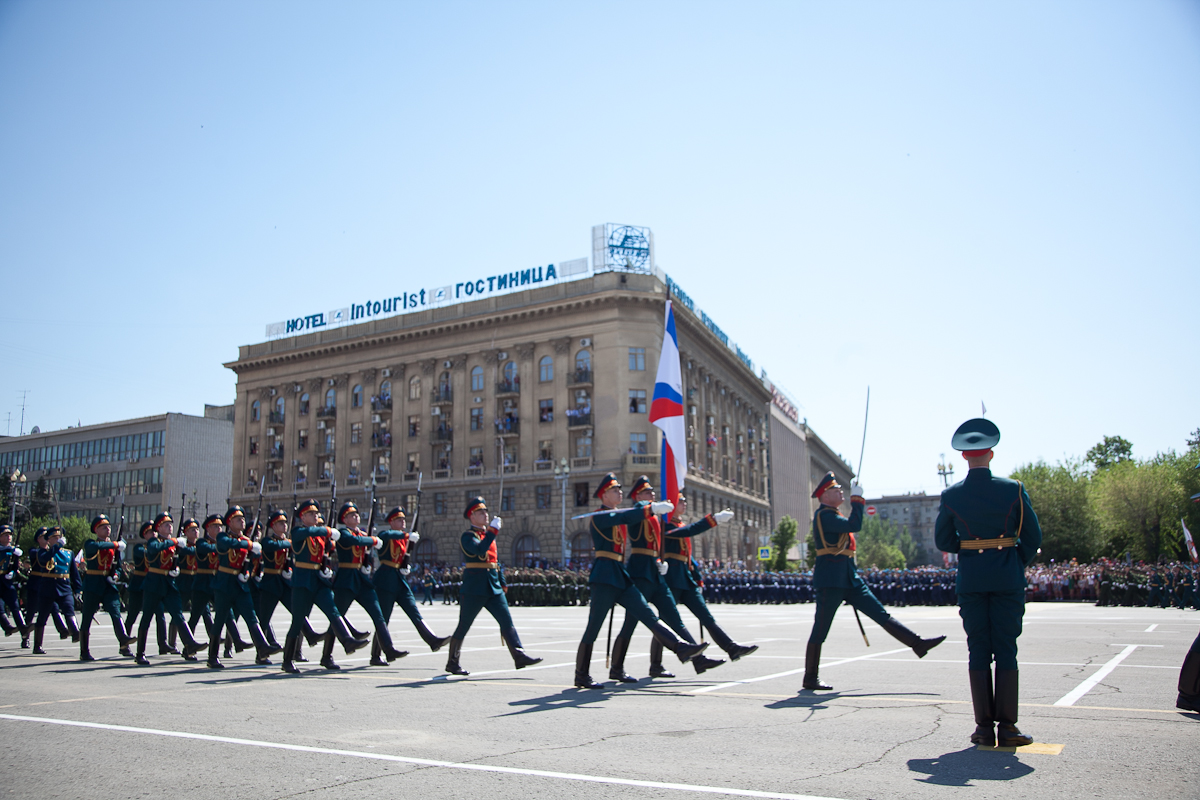 Парад в честь дня Победы на площади Павших борцов в Волгограде, 2016 год.